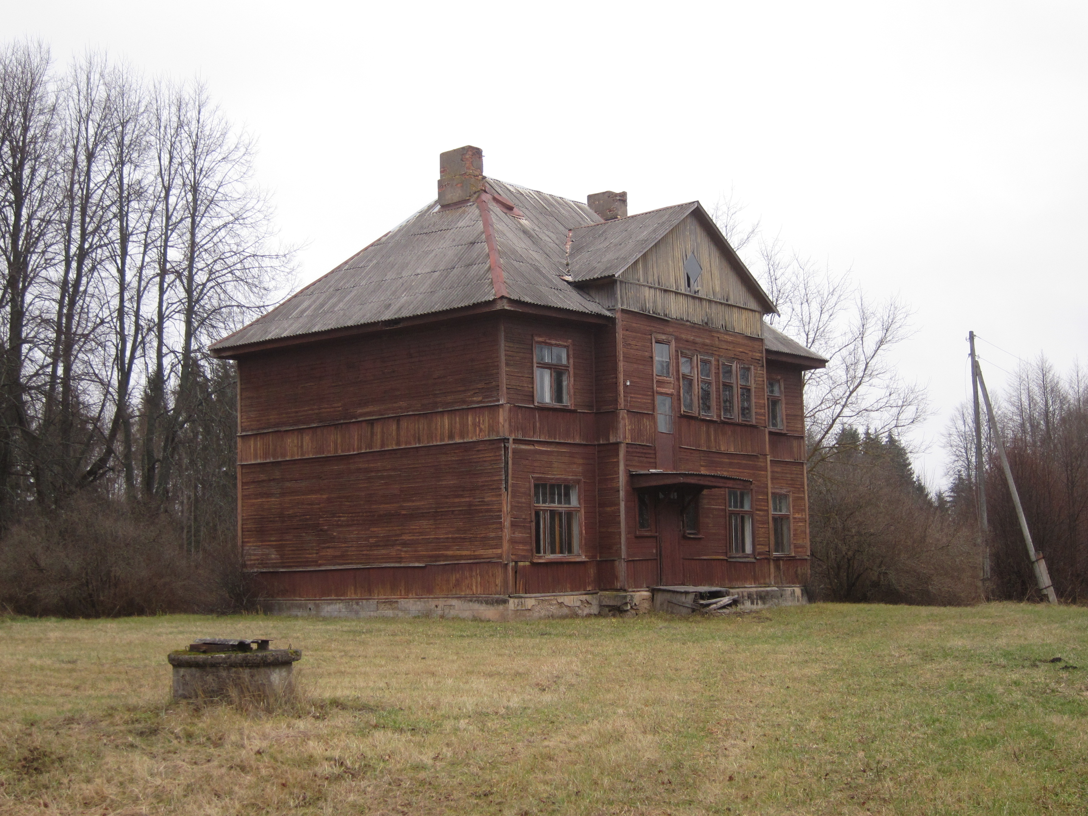 Kamaldas stacijas ēka